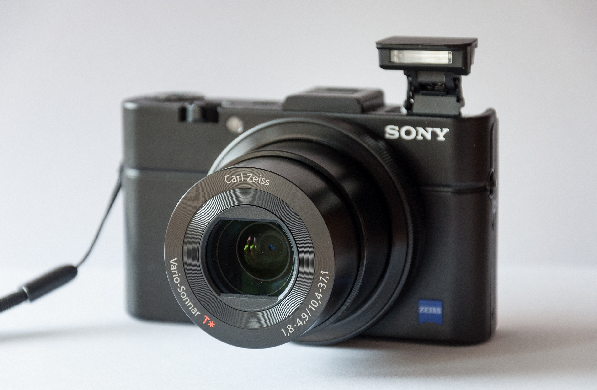 Sony Cyber-shot RX100M2 (RX100 II).